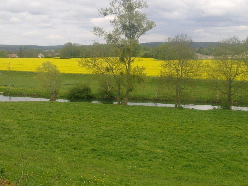 Paysage agricole du Châtillonnais (France)